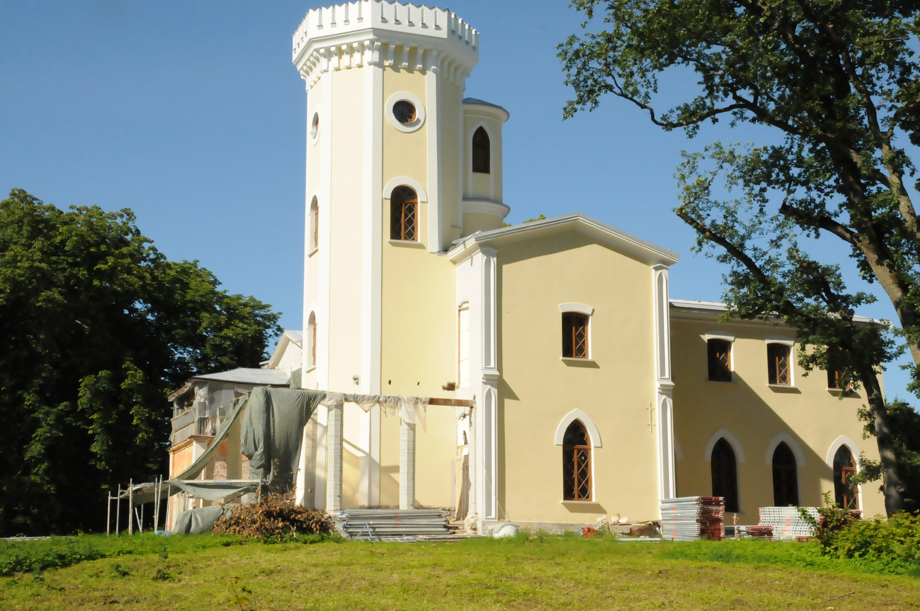 Keila-Joa loss